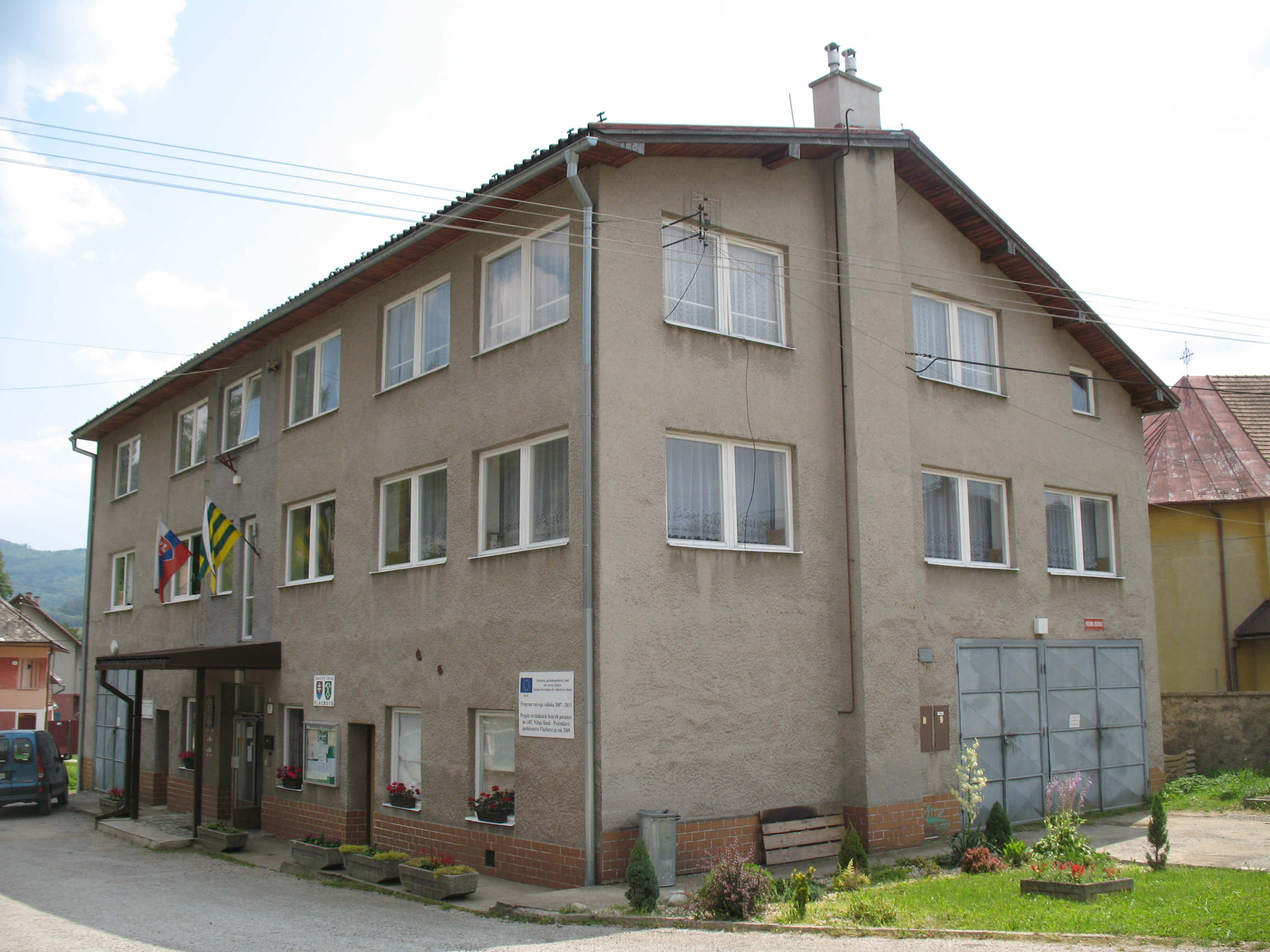 Oláhpatak